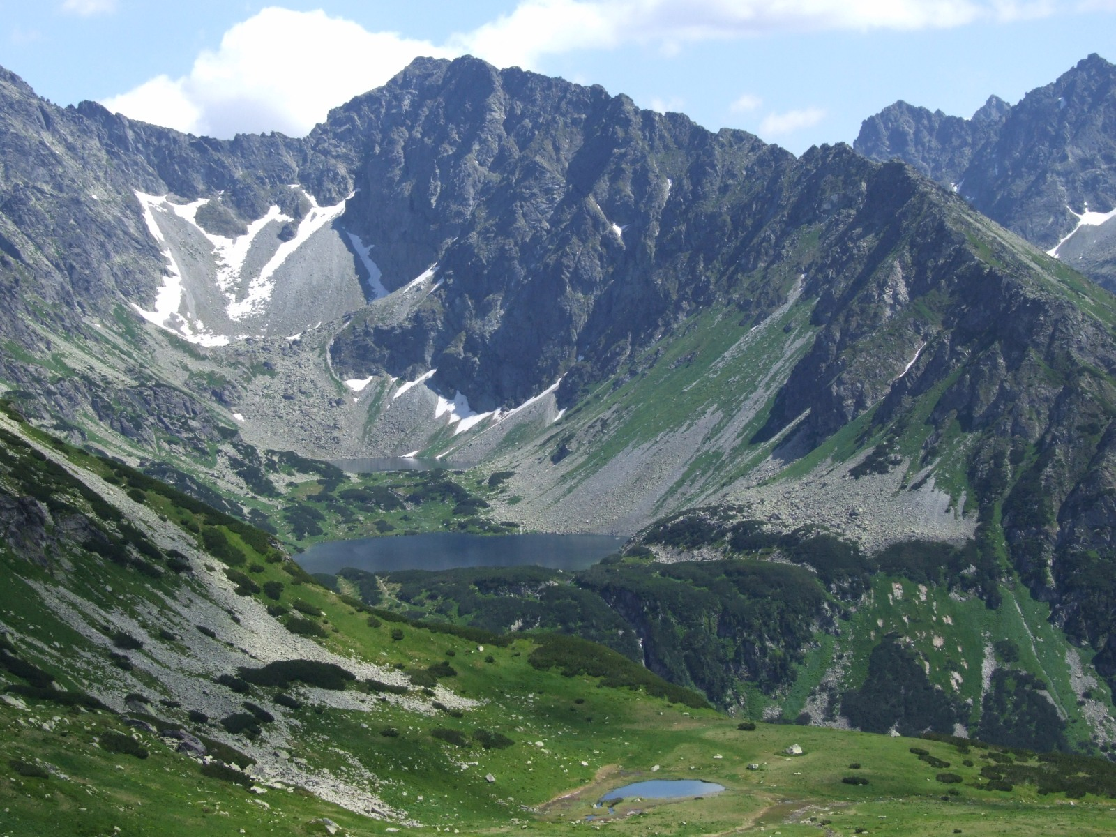 Dolina Ciemnosmreczyńska i fragment Doliny Kobylej (widok z Zaworów). Na dole Kobyli Stawek